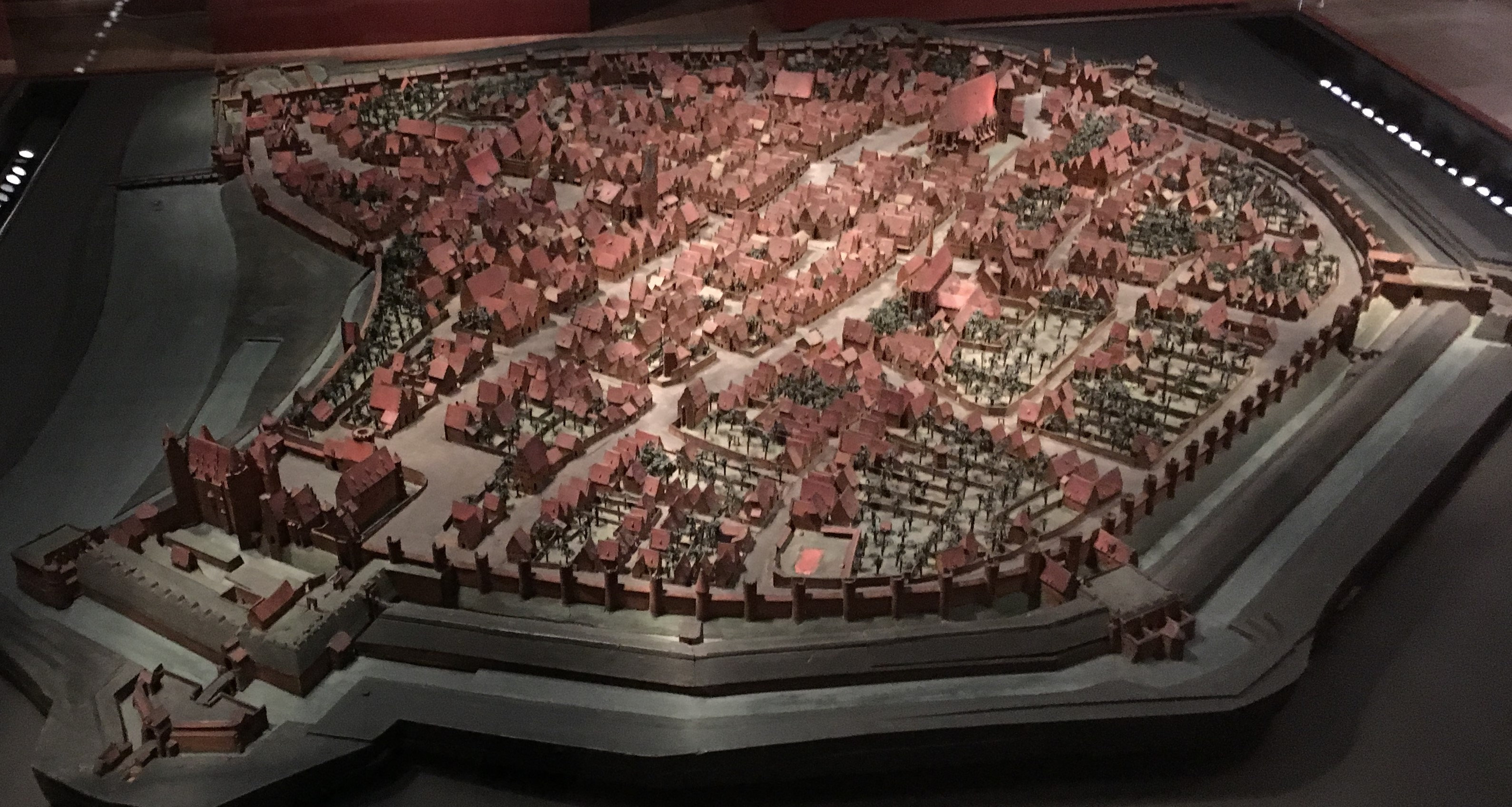 Dreidimensionales Modell der Stadt Ingolstadt, hergestellt von Jakob Sandtner im Auftrag Herzog Albrechts V. Ausgestellt im Bayrischen Nationalmuseum.